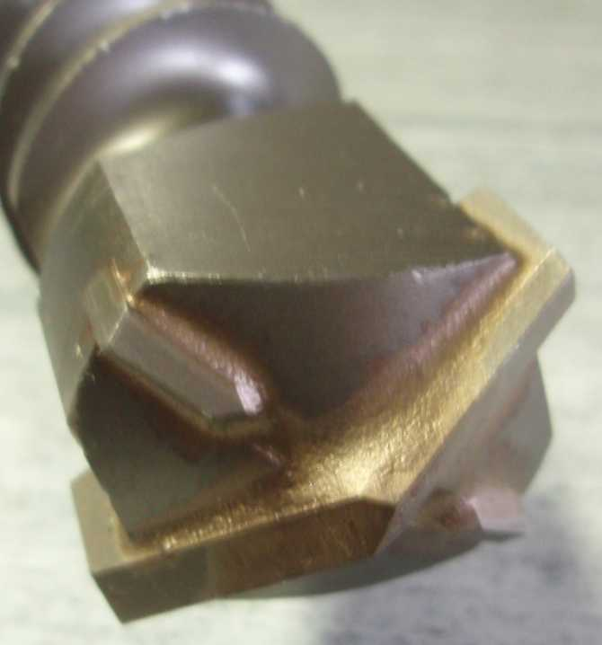 SDS max CT drill